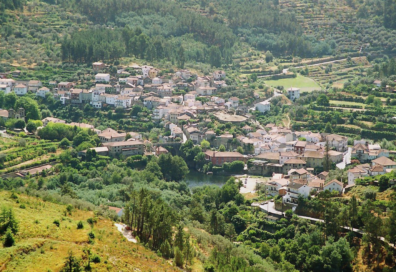 Avô - Portugal